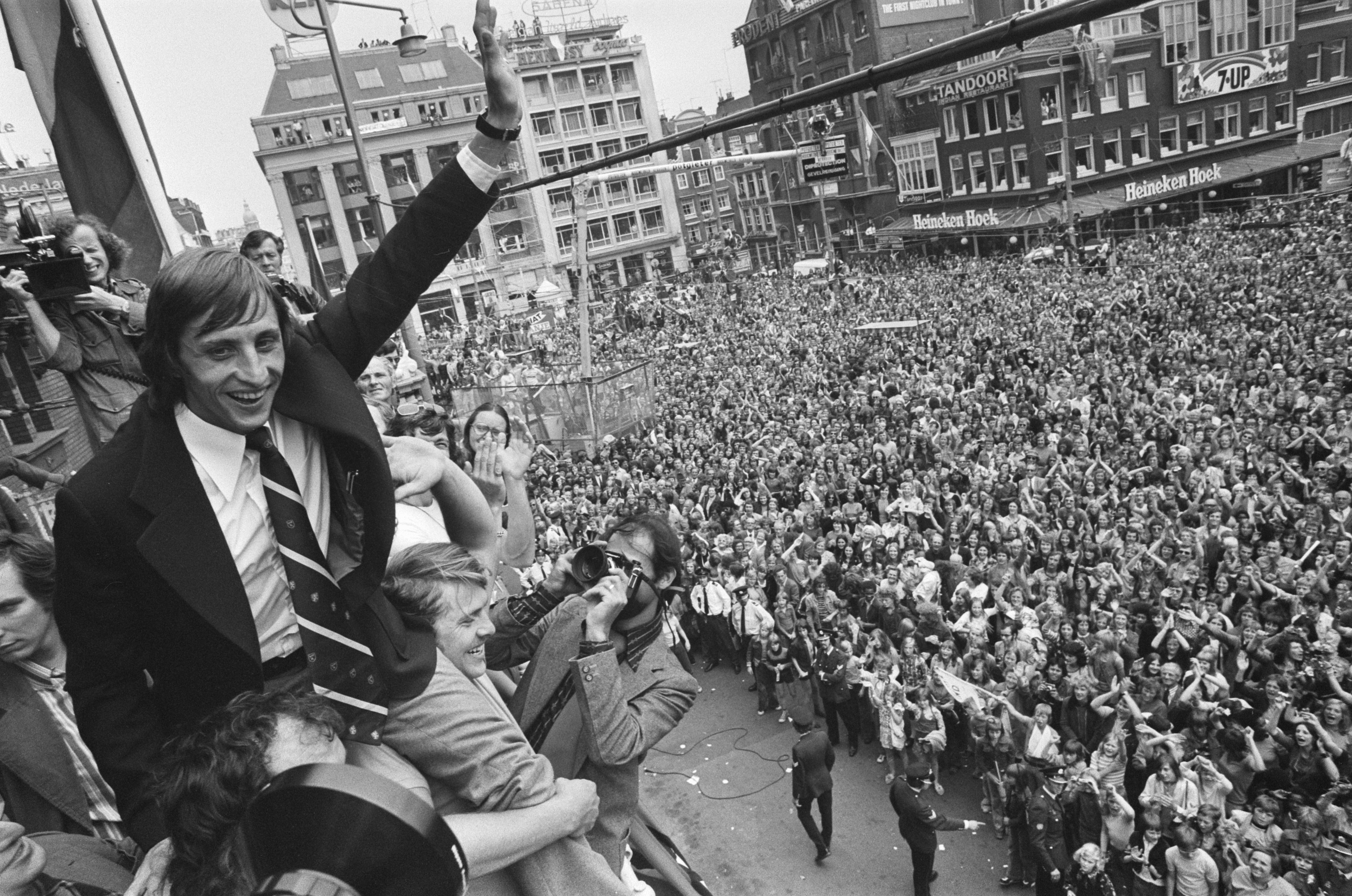 Collectie / Archief : Fotocollectie Anefo Reportage / Serie : [ onbekend ] Beschrijving : Huldiging op Leidseplein in Amsterdam; Cruijff wordt toegejuichd Datum : 8 juli 1974 Locatie : Amsterdam, Noord-Holland Trefwoorden : huldigingen, sport, voetballers Persoonsnaam : Cruijff, Johan Fotograaf : Mieremet, Rob / Anefo Auteursrechthebbende : Nationaal Archief Materiaalsoort : Negatief (zwart/wit) Nummer archiefinventaris : bekijk toegang 2.24.01.05 Bestanddeelnummer : 927-3143